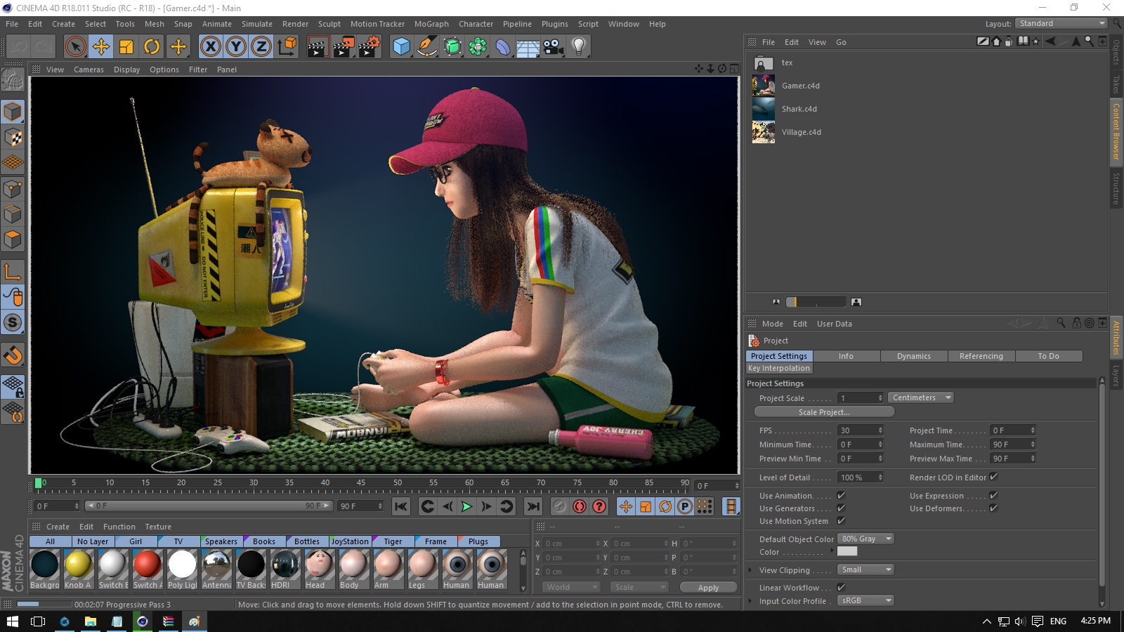 محیط نرم افزار سینما فوردی در حال پردازش تصویر.